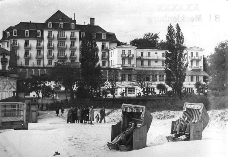 Zentralbild Junge 23.5.52 Ferienheime für die Werktätigen der Deutschen Demokratischen Republik. UBz: Blick auf das FDGB-Ferienheim "Solidarität" in Heringsdorf. Auch die Urlauber aus den Ländern der Volksdemokratien finden hier gute Annahme.